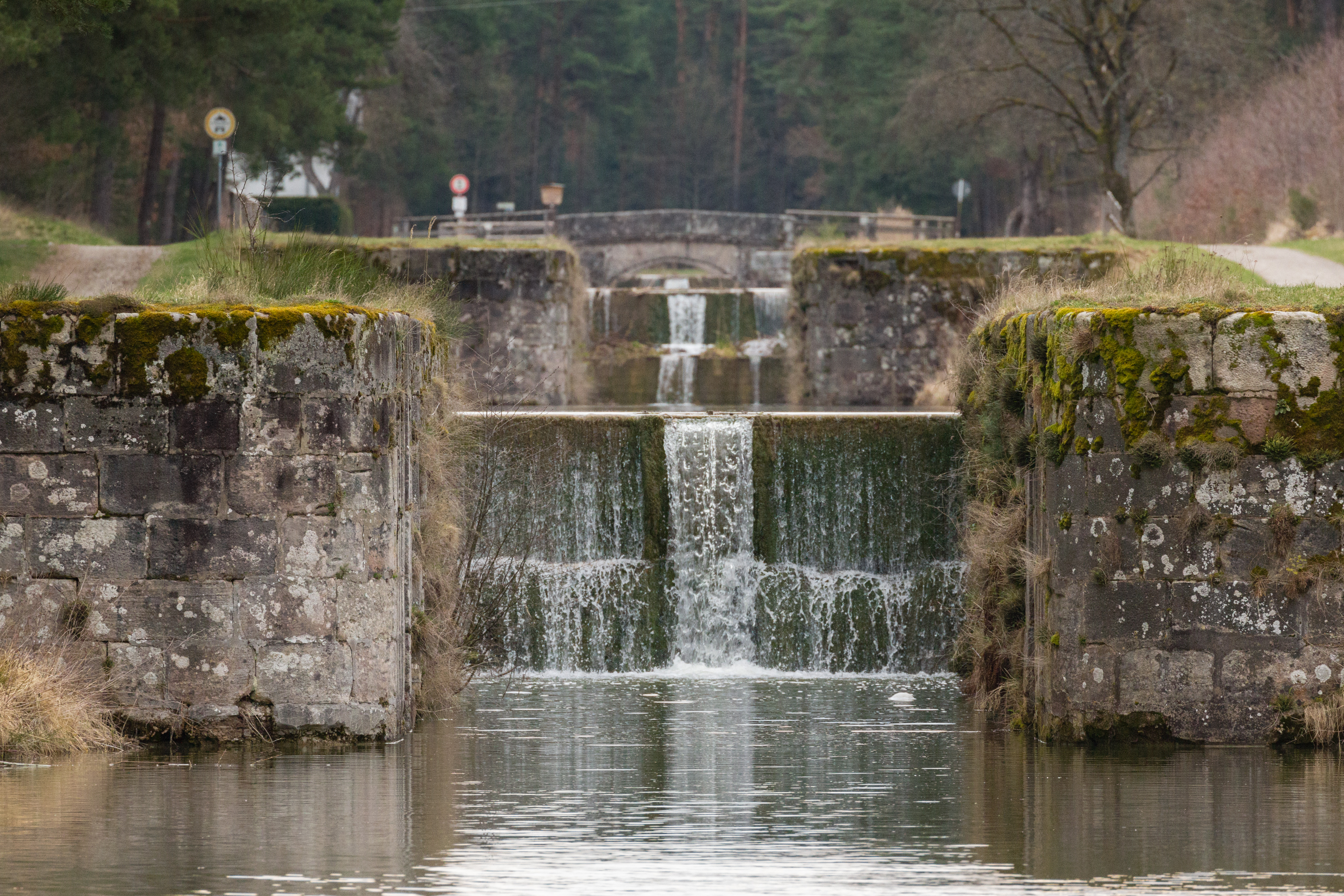 Ludwig-Donau-Main-Kanal, Schleusentreppe Schleuse54, 53 und 52This is a photograph of an architectural monument.